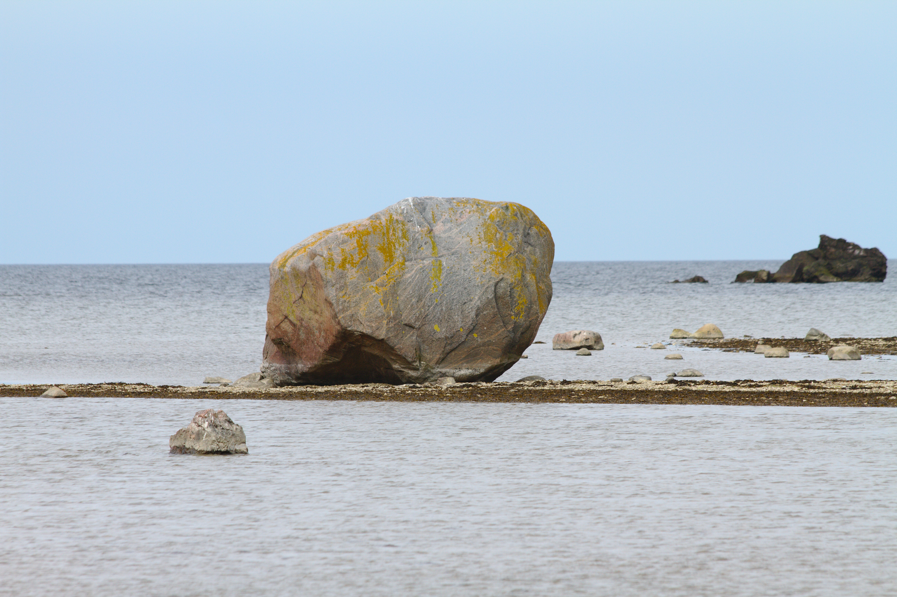 Osmussaare I rahnuderühm. Suurim gneiss Osmussaare I rahnuderühmas